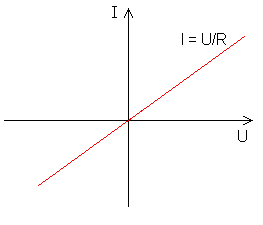 C'est dans le titre. Image faite maison (par moi). Je la mets en licence libre.